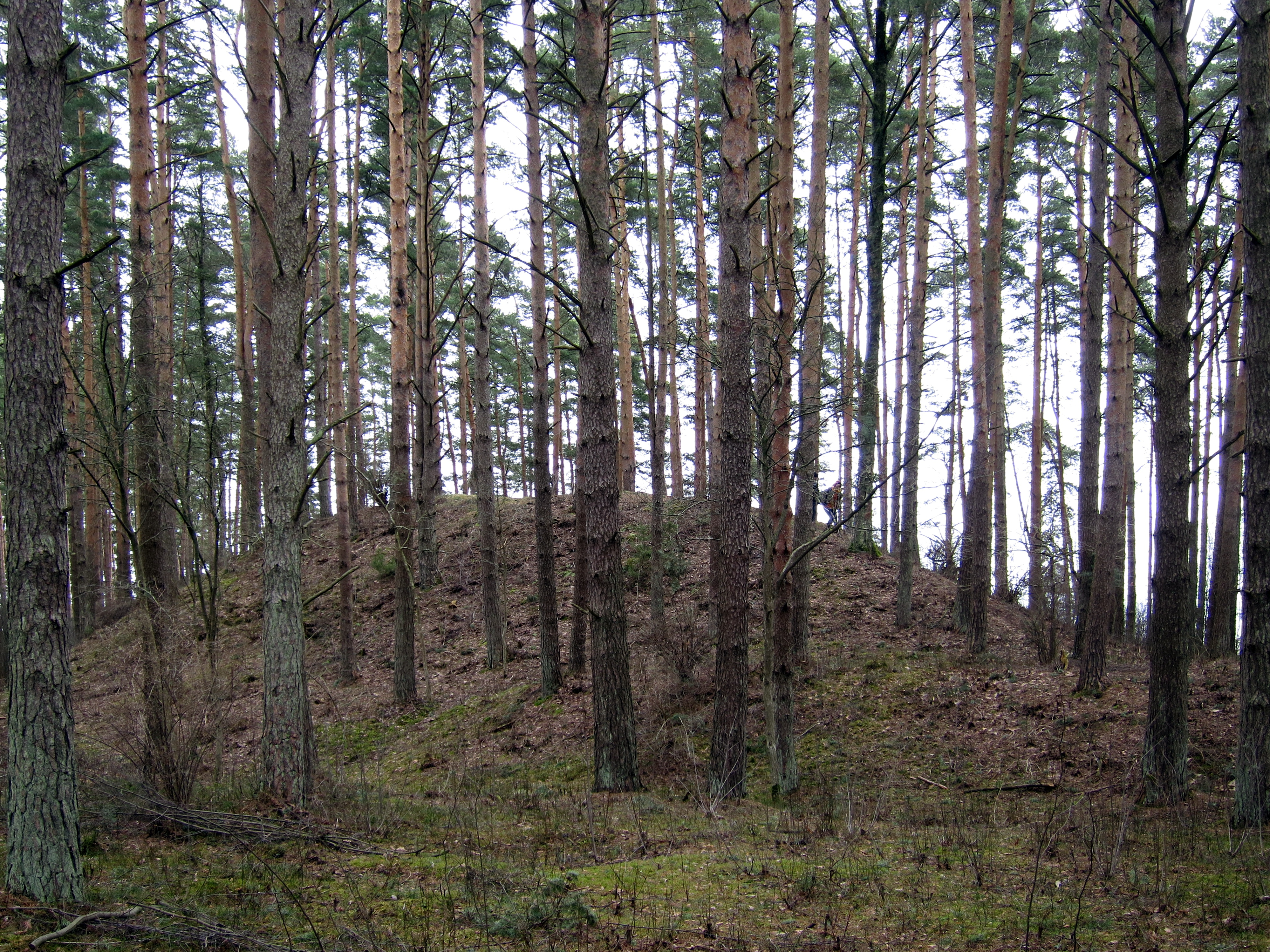 Babītes pilskalns